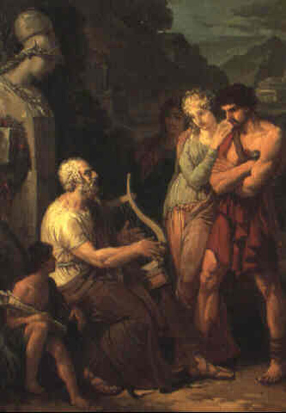 Homère chantant l’Odyssée Jean-Pierre Saint-Ours (1752–1809) Description painter Date of birth/death4 April 17526 April 1809Location of birth/deathGenevaGenevaWork locationGeneva, Paris, RomeAuthority control VIAF: 17527588 ISNI: 0000 0001 2122 6605 ULAN: 500014563 LCCN: nr96001313 GND: 119258897 WorldCat